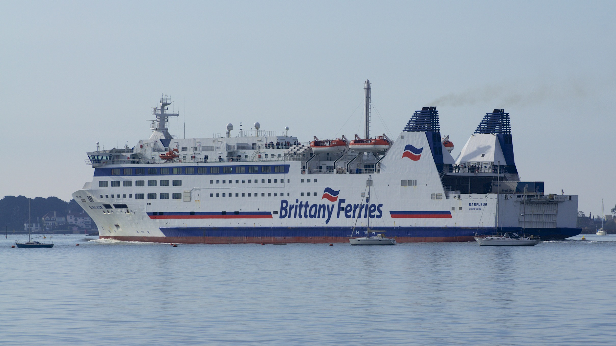 Departing Poole Harbour.